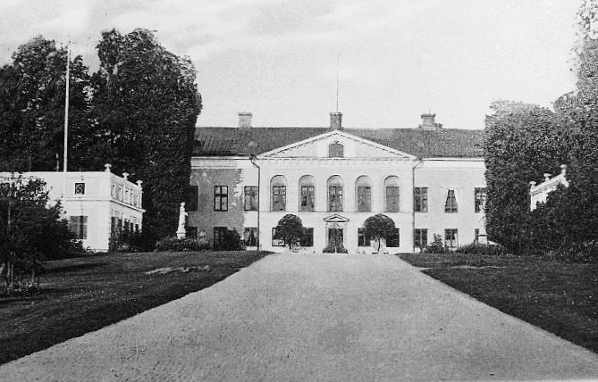 Taxinge-Näsby slott